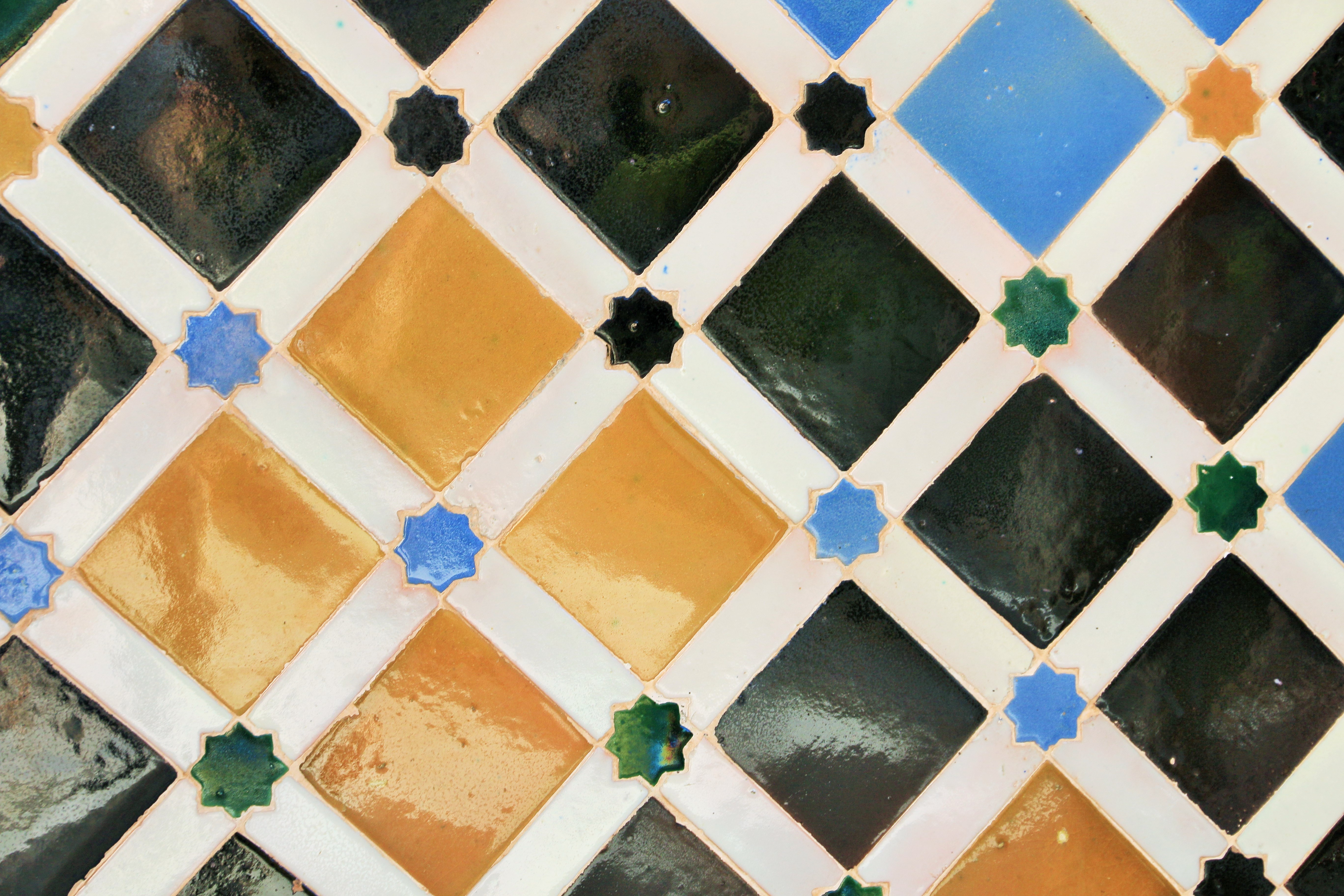 tiles in alhambra